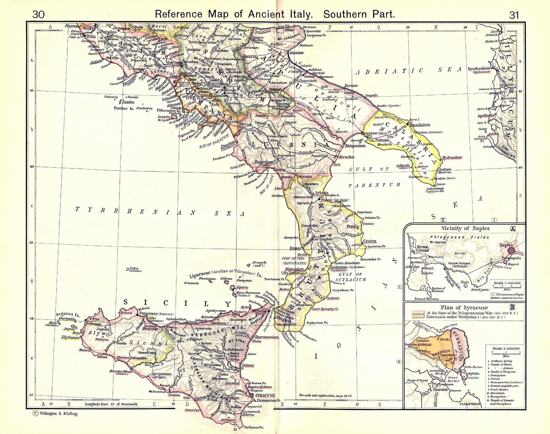 Karte Italiens und Siziliens in der Antike, von William Robert Shepherd, 1911